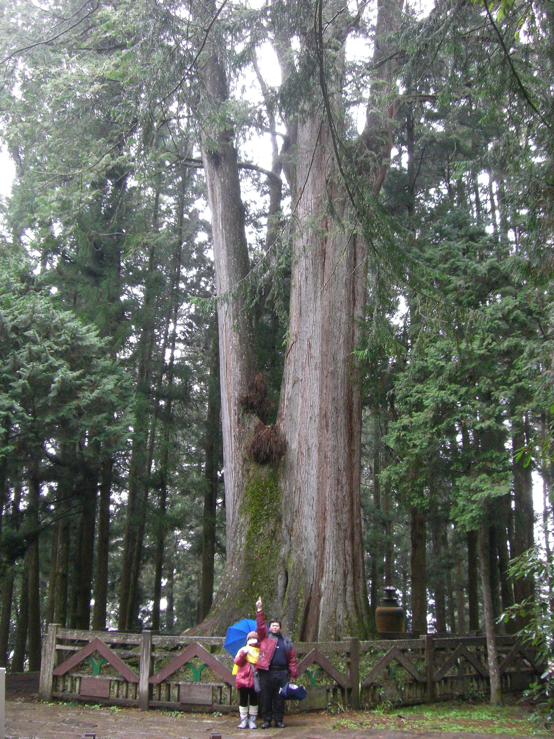 阿里山上的千歲檜